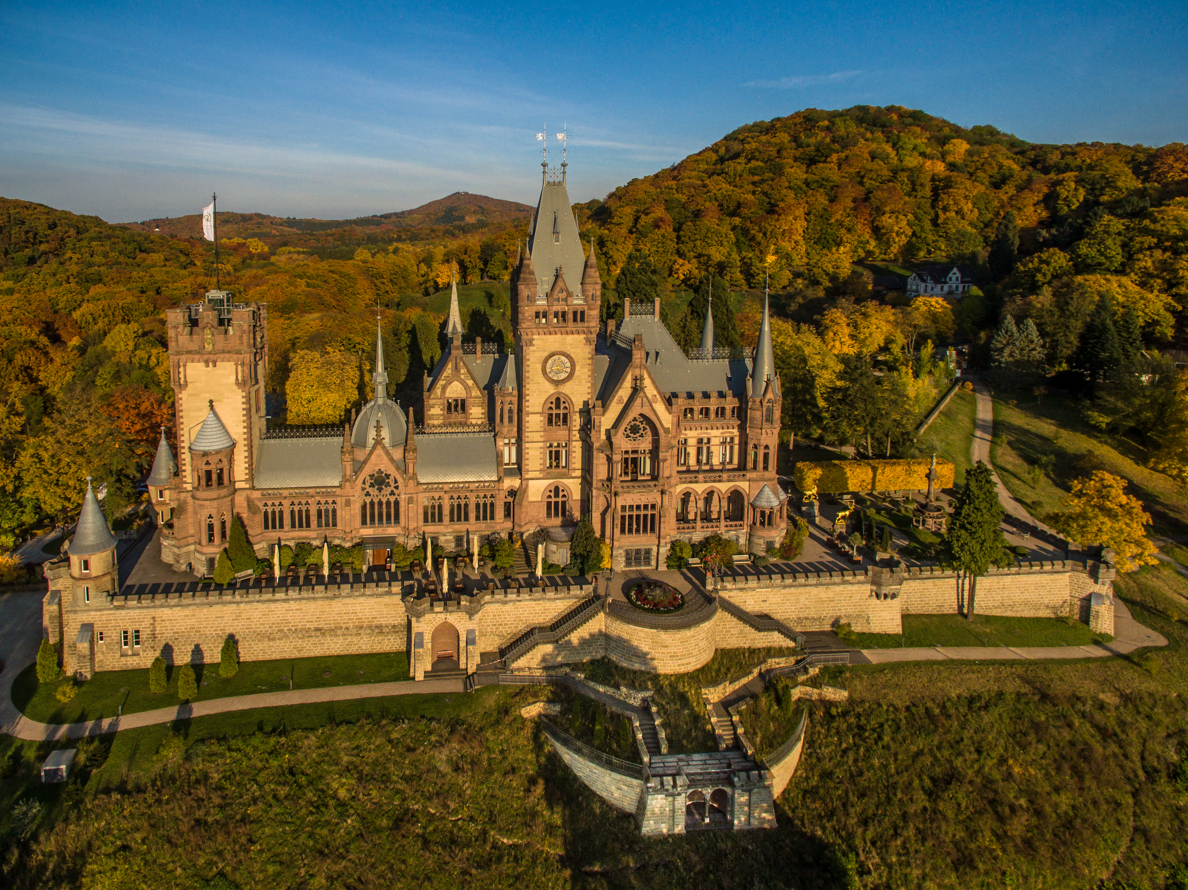 Luftaufnahme des Schloss Drachenburg in Königswinter